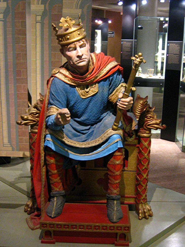 Figura representando a Guillermo I de Inglaterra tras ser coronado rey de Inglaterra, en el museo de Bayeux